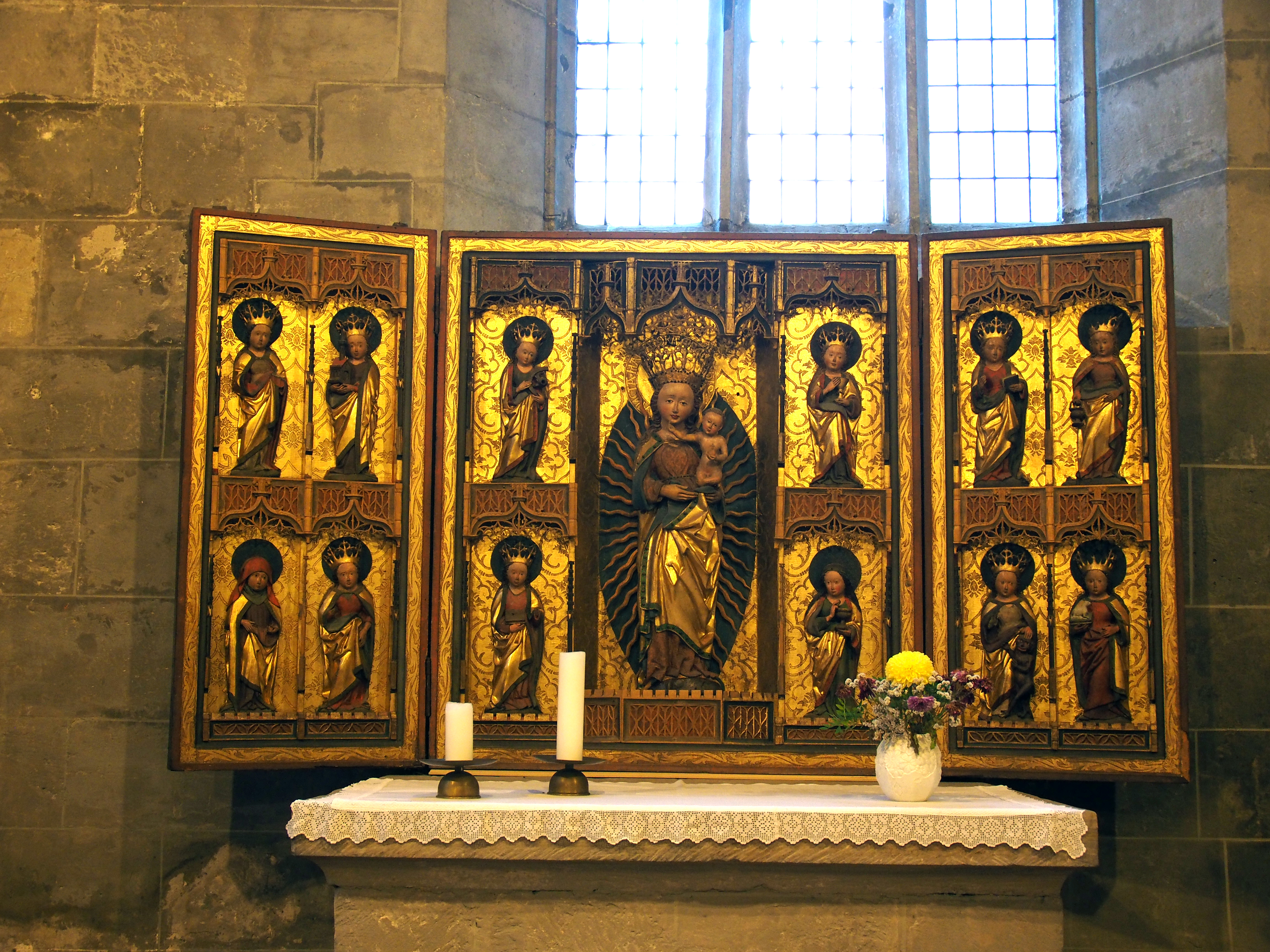 Gotischer Flügelaltar von 1480, unbekannter Künstler, mitteldeutsche Herkunft, Kalandskapelle St. Benedikti, Quedlinburg, Sachsen-Anhalt